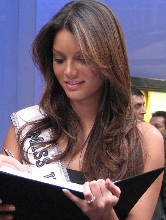 Zuleyka Rivera at Plaza Antara, Polanco, Mexico